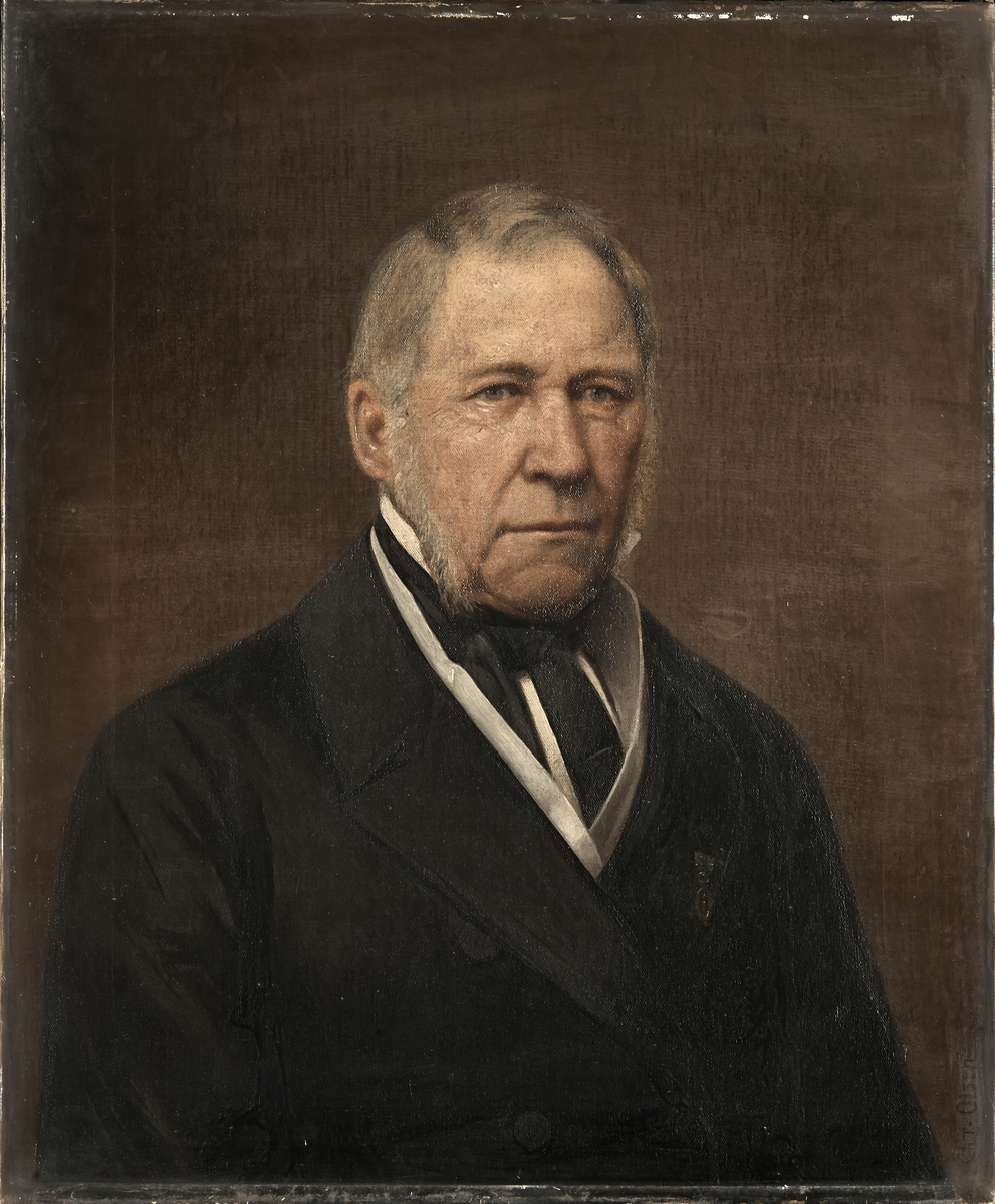 Portrett av Foged Ole Gjerdrum